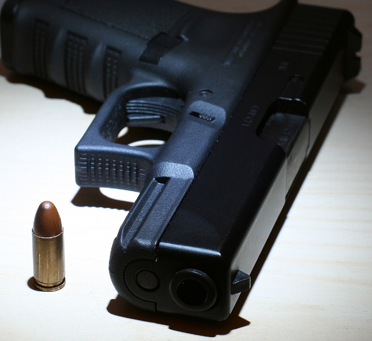 GLOCK 17 semiauto pistol